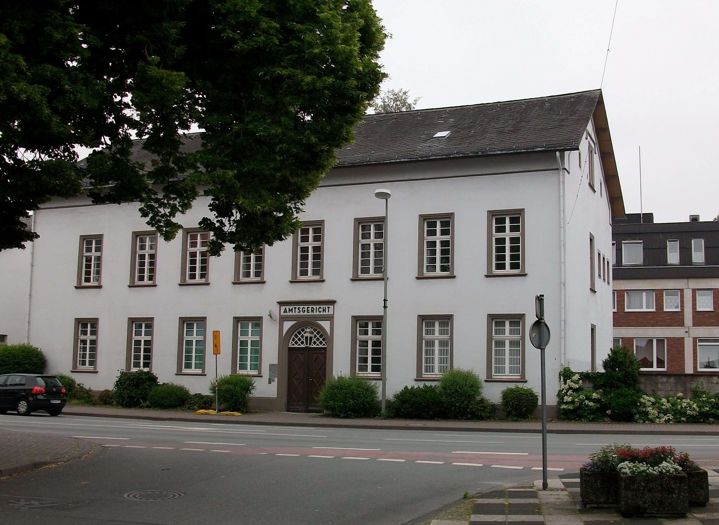 Marsberg, Amtsgericht, denkmalgeschütztes Gebäude aus dem Jahr 1846 (Germany)